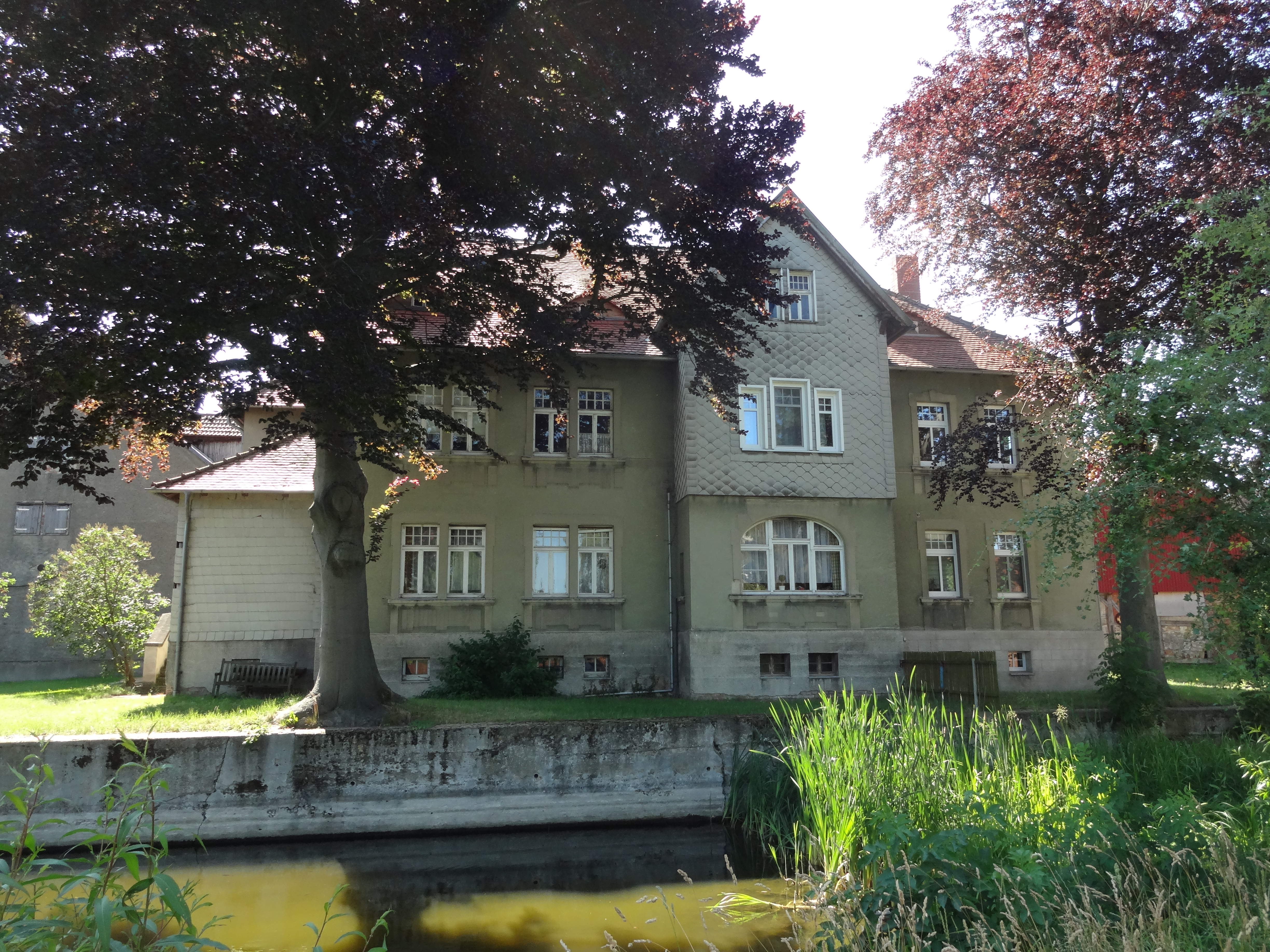 denkmalgeschützter Gutshof in der Poststraße 3 in Langeln, Gemeinde Nordharz